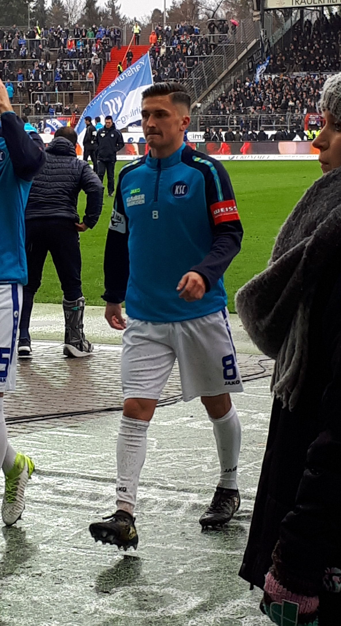 Fußballspieler Marcel Mehlem beim Heimspiel des Karlsruher SC gegen die SpVgg Unterhaching am 20. Januar 2018.